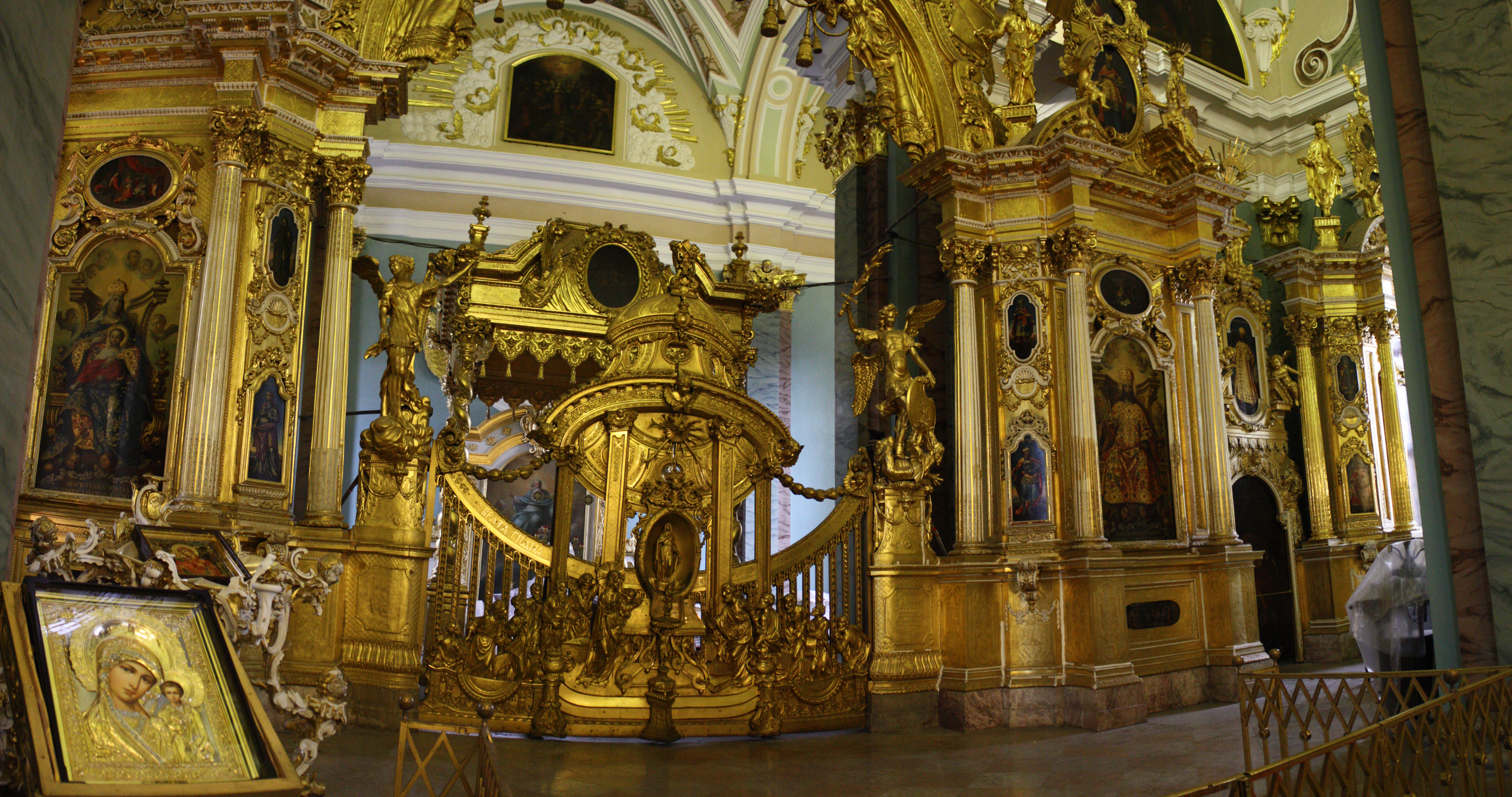 Peter und Paul Kathedrale Sankt Petersburg 2009 Touristenbilder